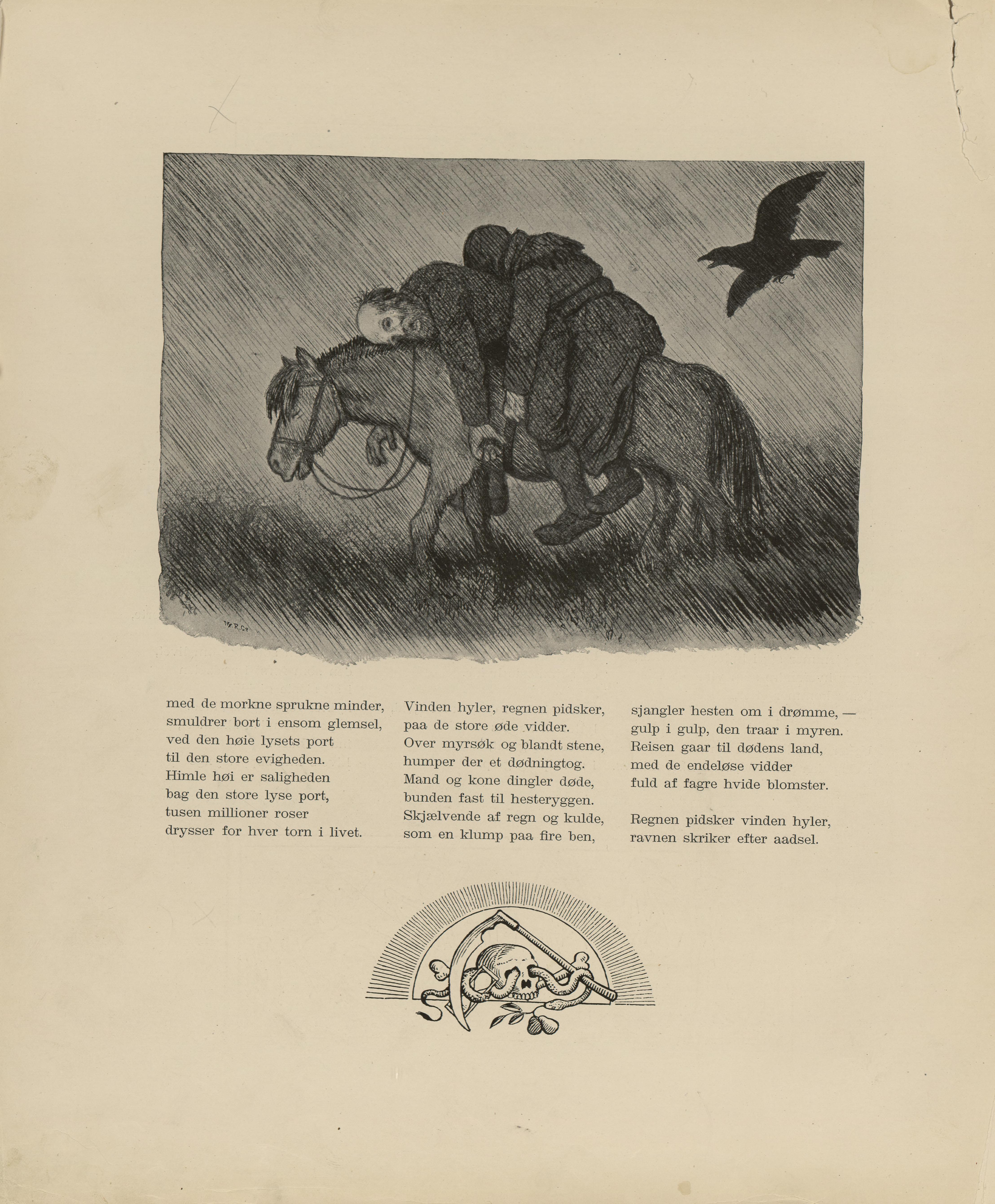 Illustrasjon hentet fra boken Svartedauen av Kittelsen, Th. og utgitt av L.E. Tvedte (no, 1901)